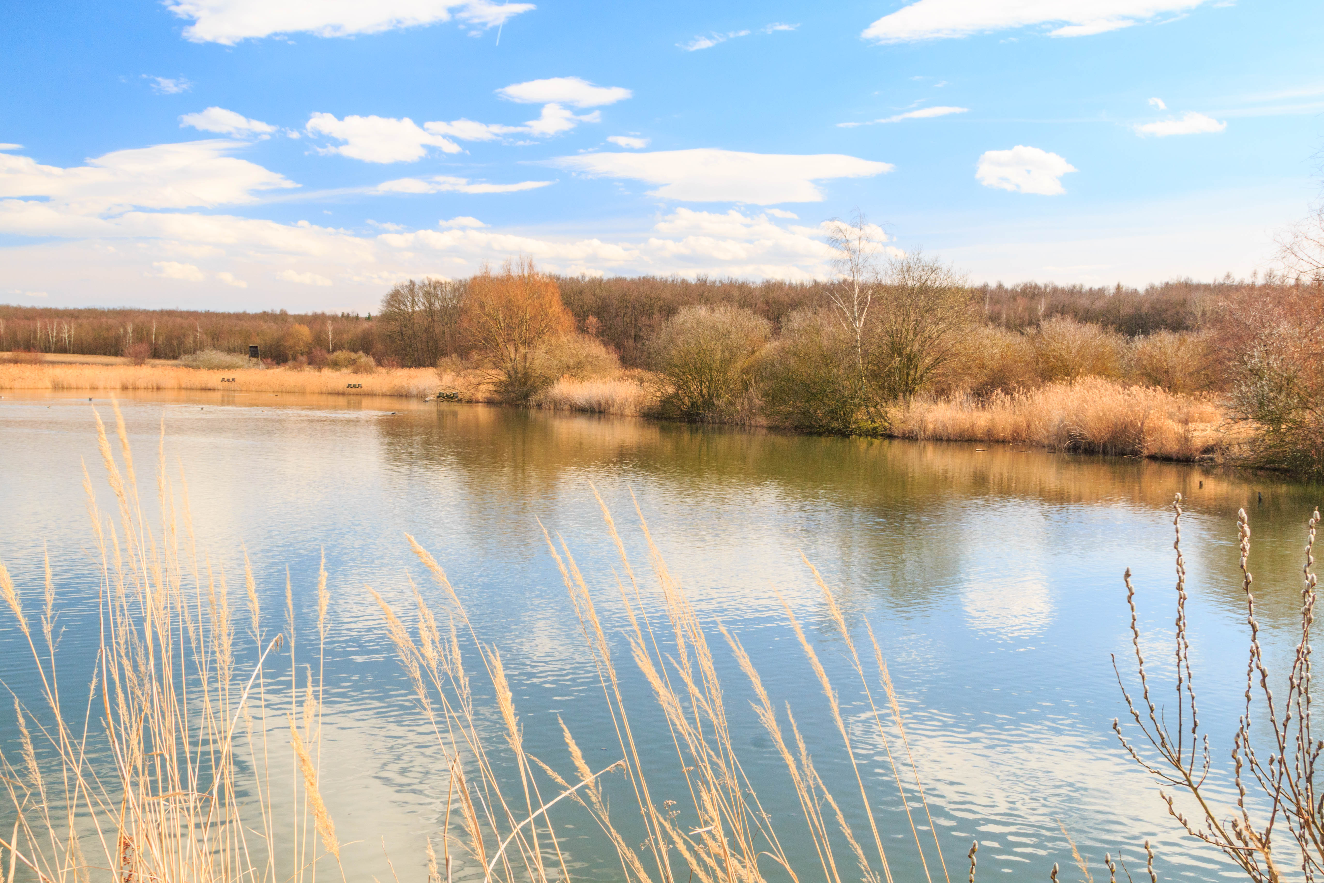 Rybník Bejřov u Obědovic Project: Vodstvo.